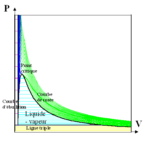 Isothermes d'Andrews dans le diagramme de Clapeyron des transitions de phases d'un corps pur simple.